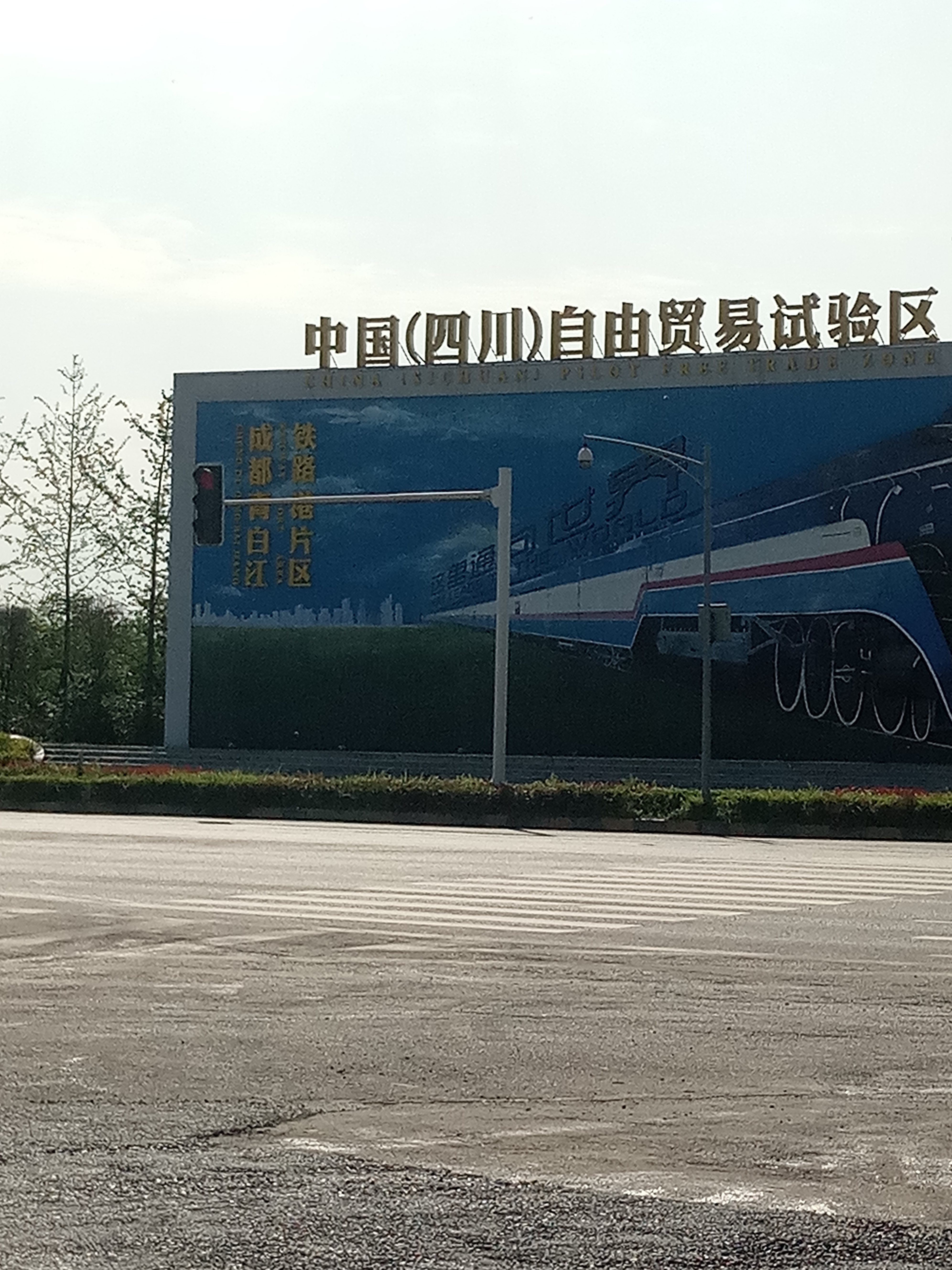 位于青白江区的四川自由贸易试验区（成都国际铁路港）